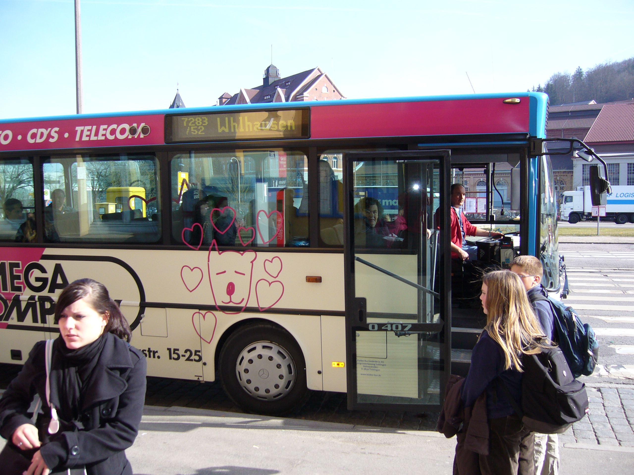 Bus am Bahnhof Tuttlingen. Baden-Württemberg, Deutschland.